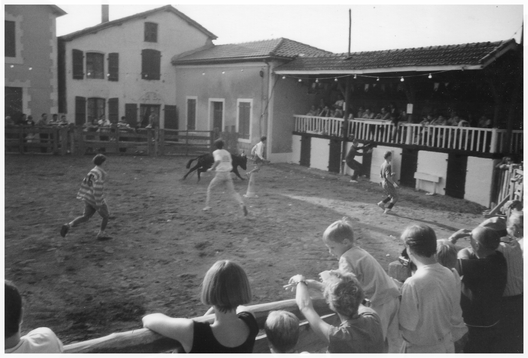 Arènes de Baigts / piste clôturée avec des barrières en bois construites au début du XXe siècle.